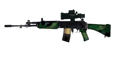 INSAS rifle